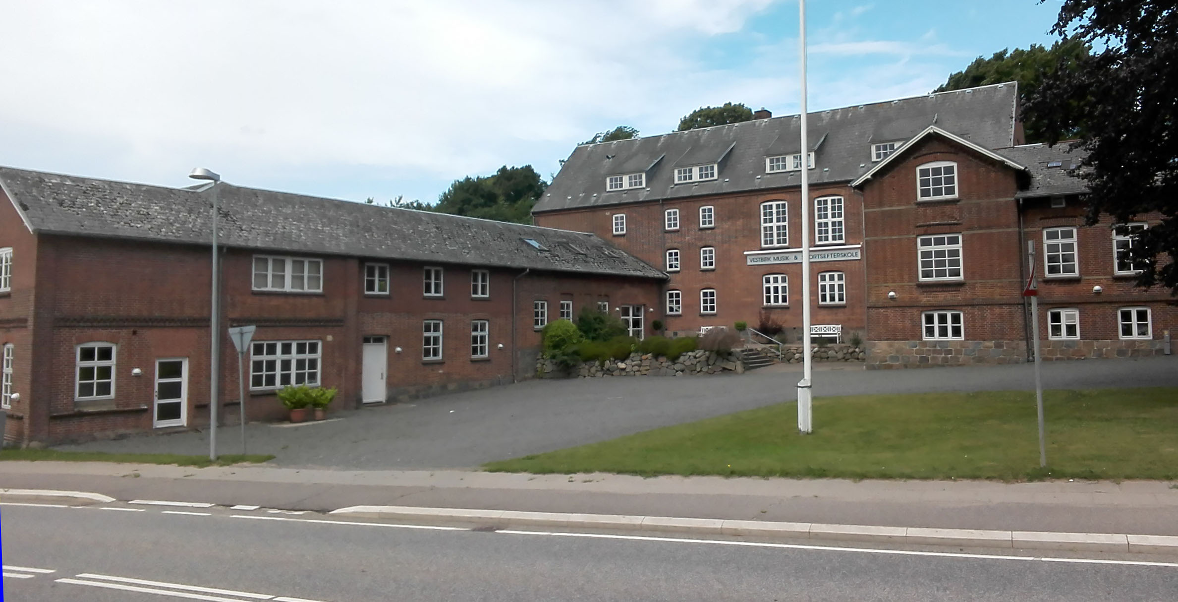 Den tidligere Vestbirk Højskole, nu en del af Vestbirk Musik- & Sportsefterskole